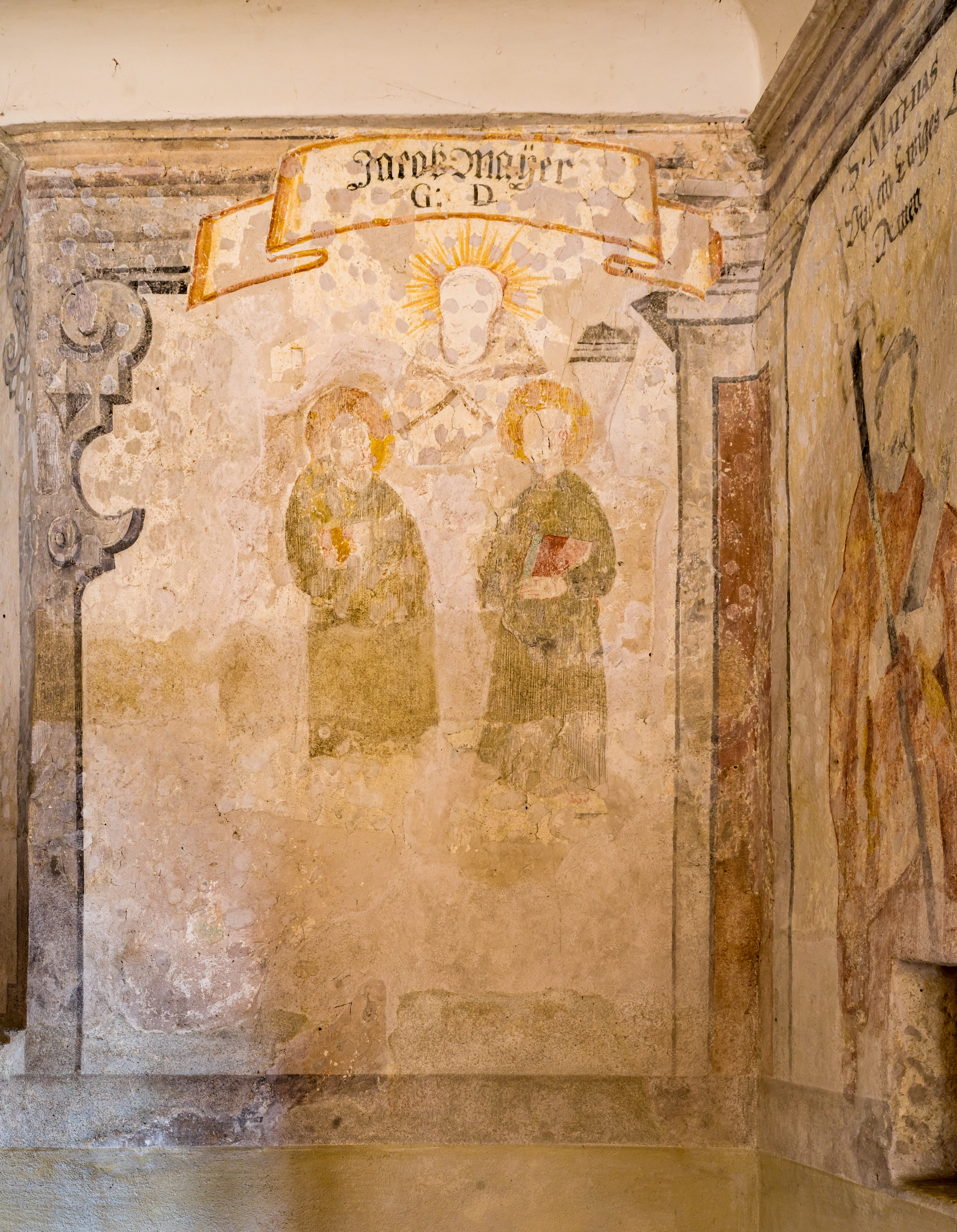 Bilder aus Staufen im Breisgau, die St. Magdalenenkapelle